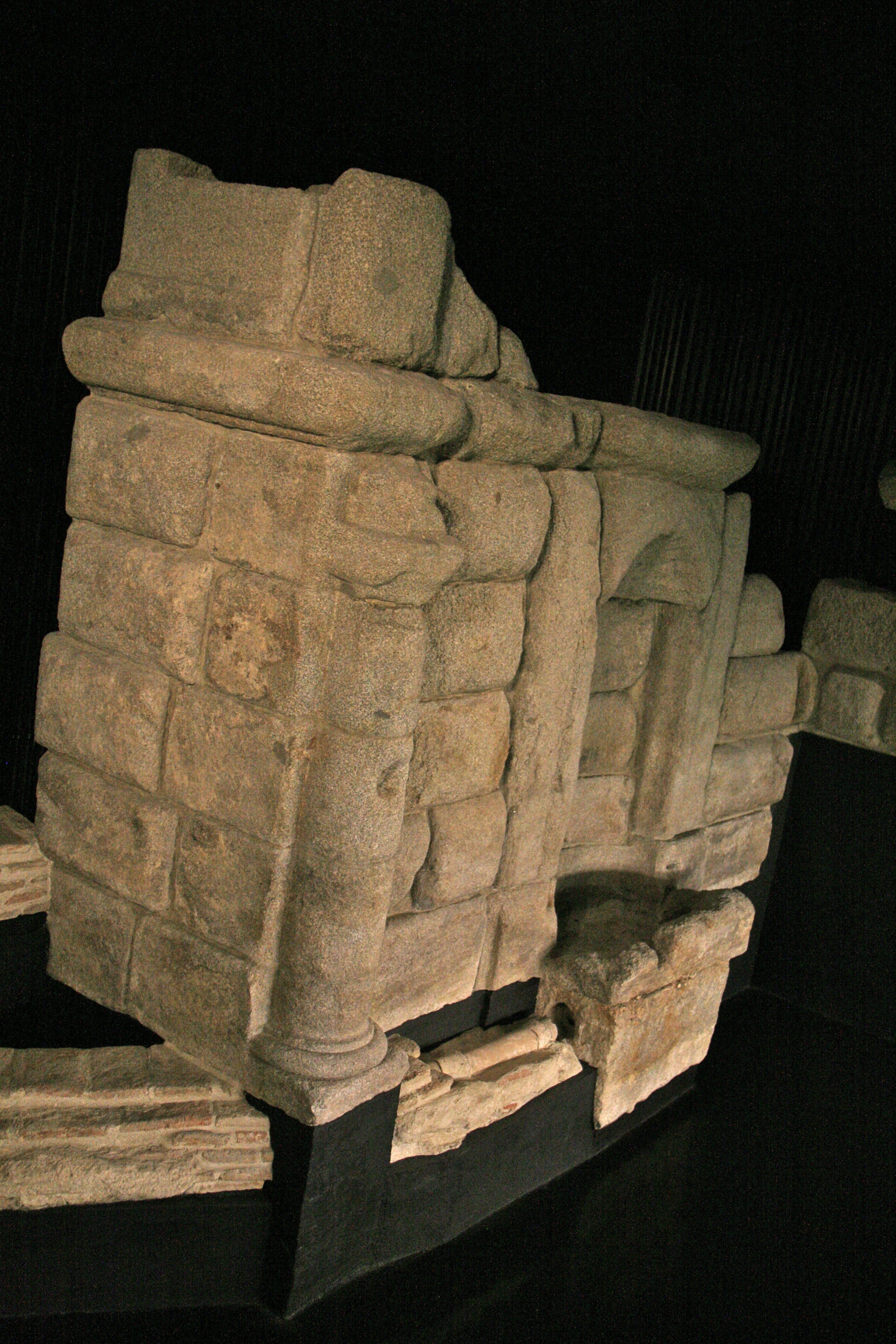 Fuente de los Caños del Peral - Original